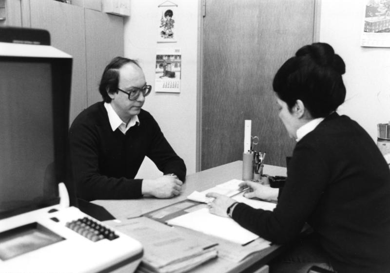 8.2.1982 Berlin (West) Beratung eines Arbeitslosen (links) im Arbeitsamt II, Sonnenallee 262